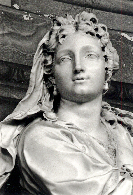 Eléonor-Fébronie de Bergh, Duchesse de Bouillon (Cluny, Hôtel-Dieu). Sculptor: Pierre Le Gros the Younger, before 1707.